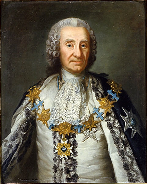 Gustaf Fredrik von Rosen, Född 1688, Död 1769. Avmålad av Carl Fredrich Brander, svensk, Född 1705, Död 1779. Tillskriven. Nationalmuseums inventarienummer: NMGrh 1530